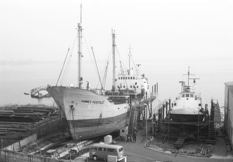 Neue Slipanlage kann Schiffe bis zu 60 Meter Länge und 900 Tonnen Tragfähigkeit aufnehmen. In der Bildmitte Küstenmotorschiff HANNES FESEFELDT aufgeslippt.